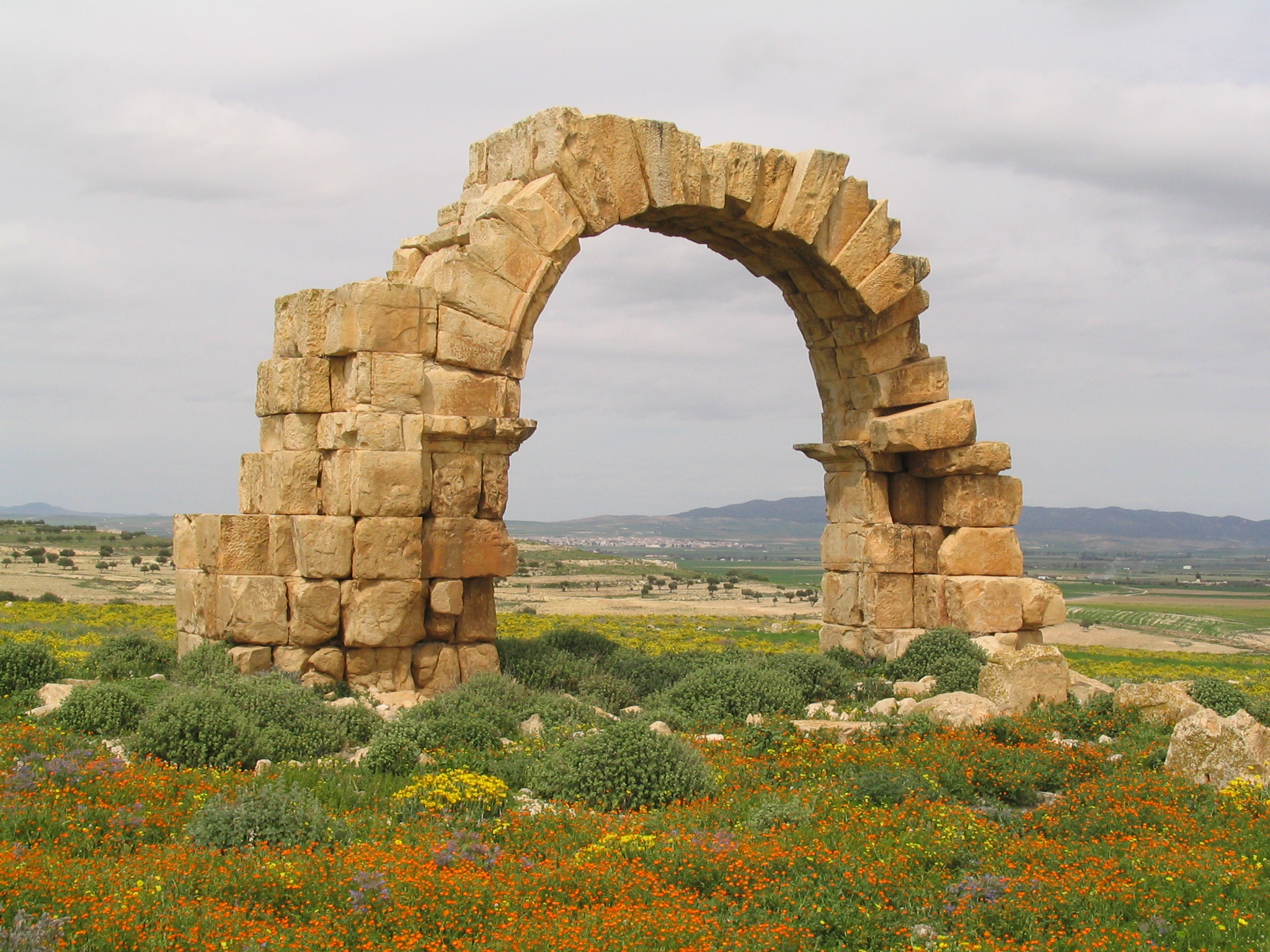 ruine de la ville romaine d'Assuras